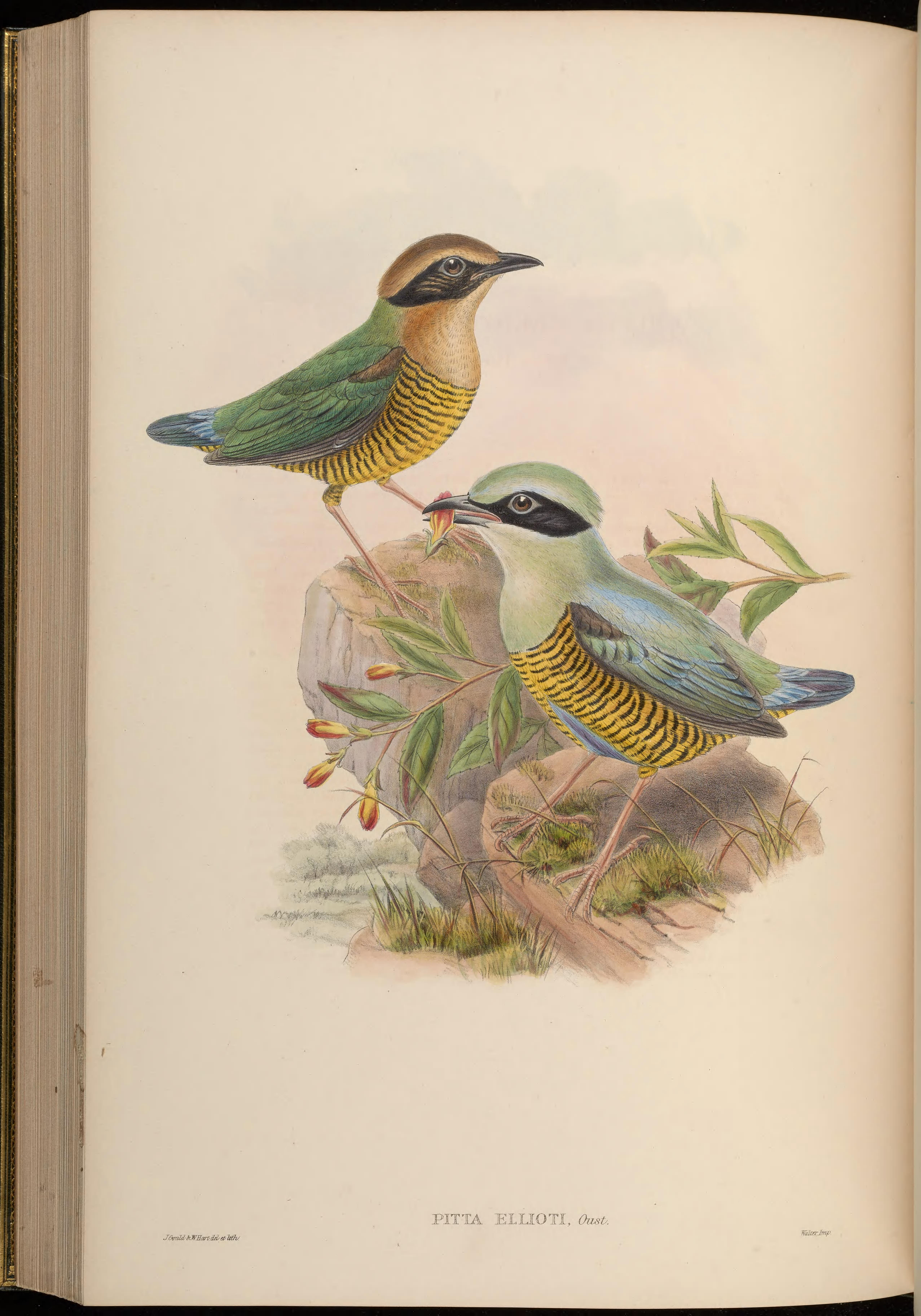 Pitta ellioti = Hydrornis elliotii[1]